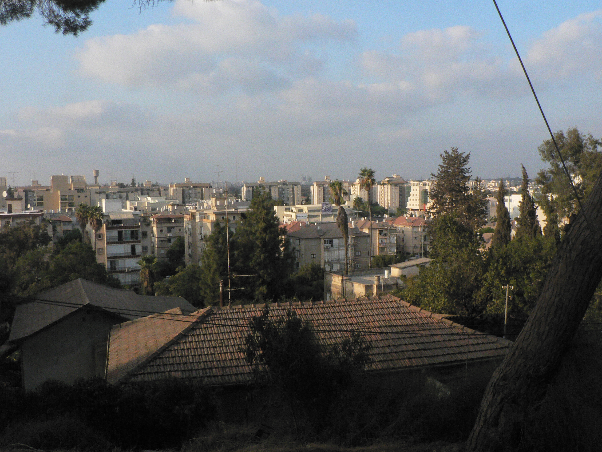 Ness Ziona נס ציונה